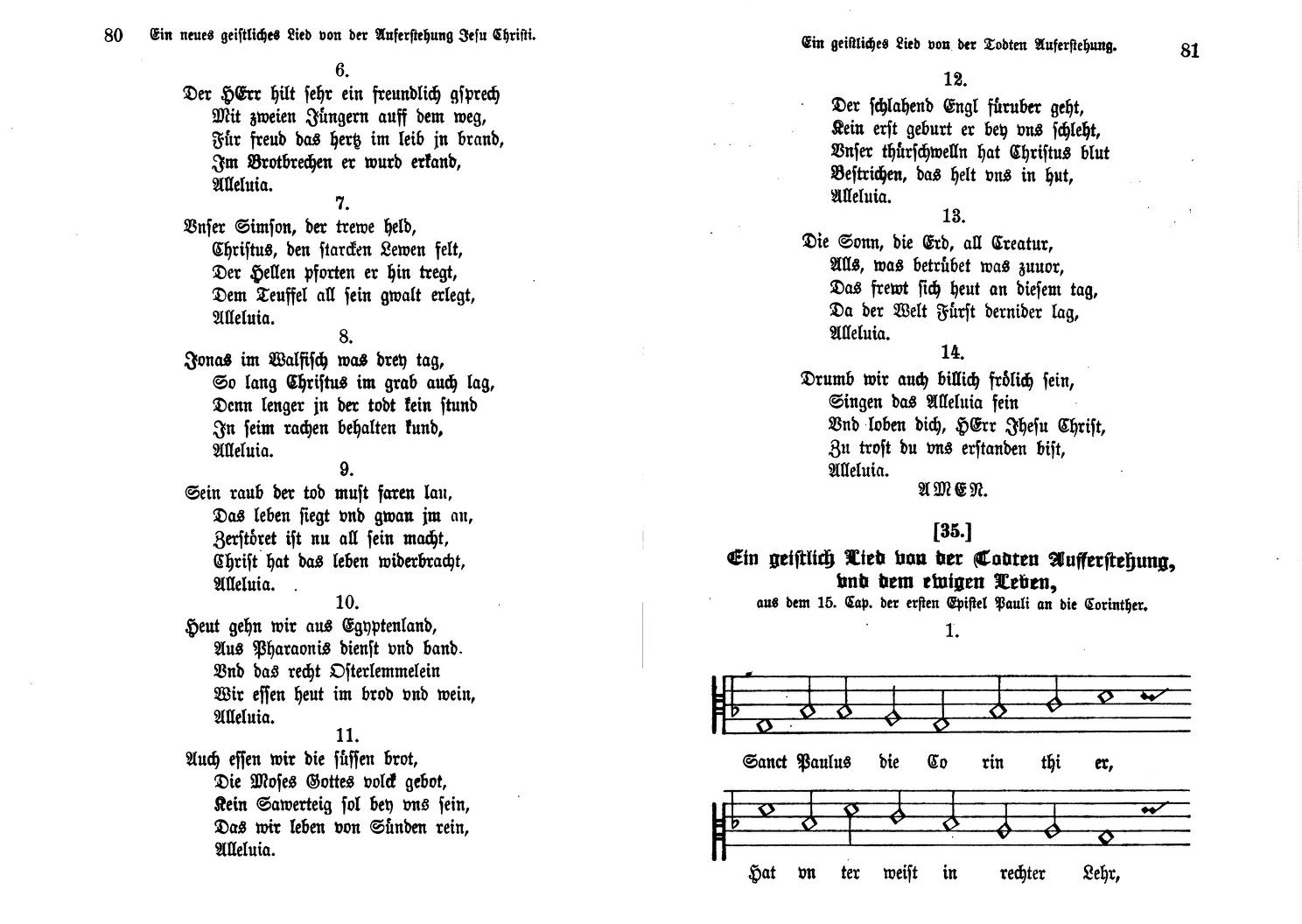 Nicolaus Herman: Erschienen ist der herrlich Tag, Urtext 1561